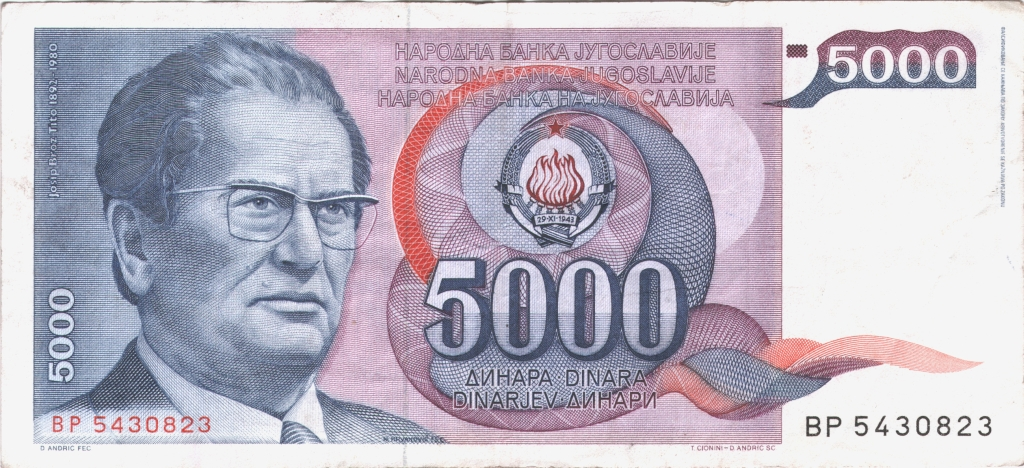 5000 dinara iz 1985. godine, SFRJ